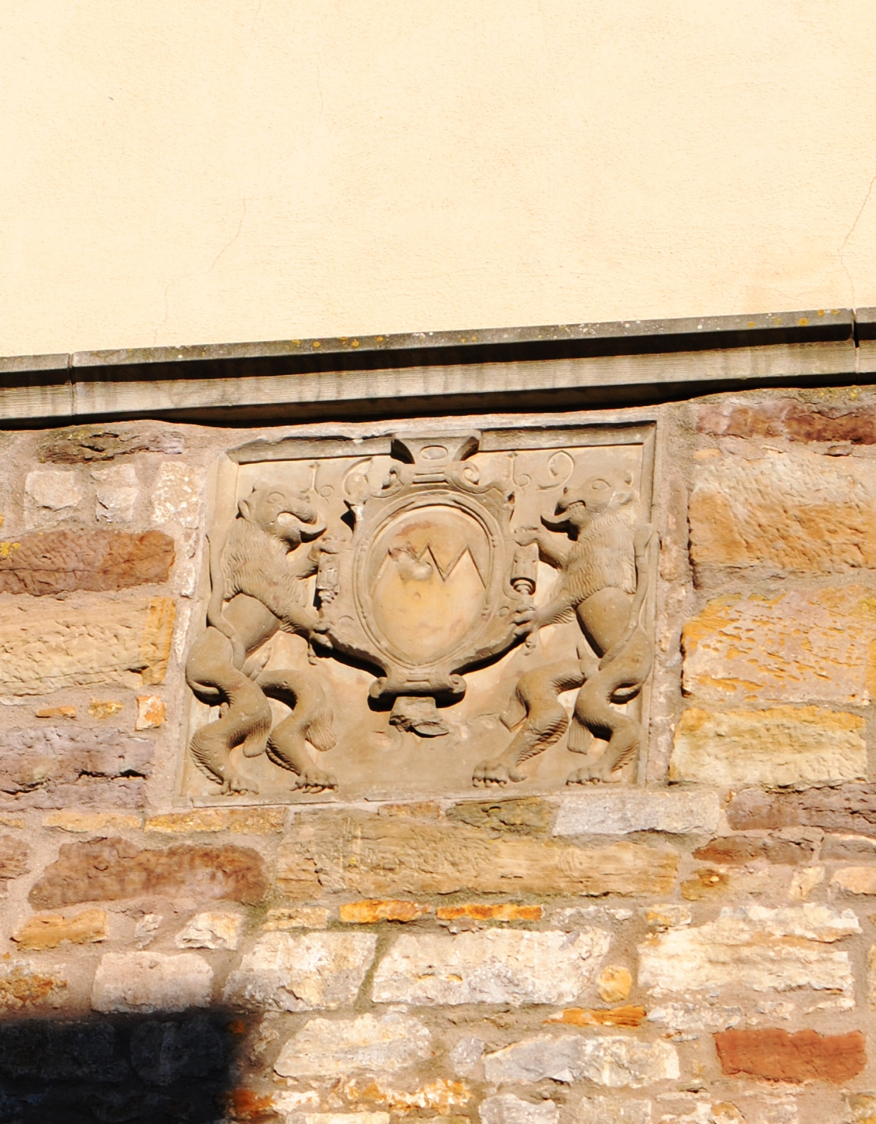 Sandsteinrelief, Osten, Willanzheim